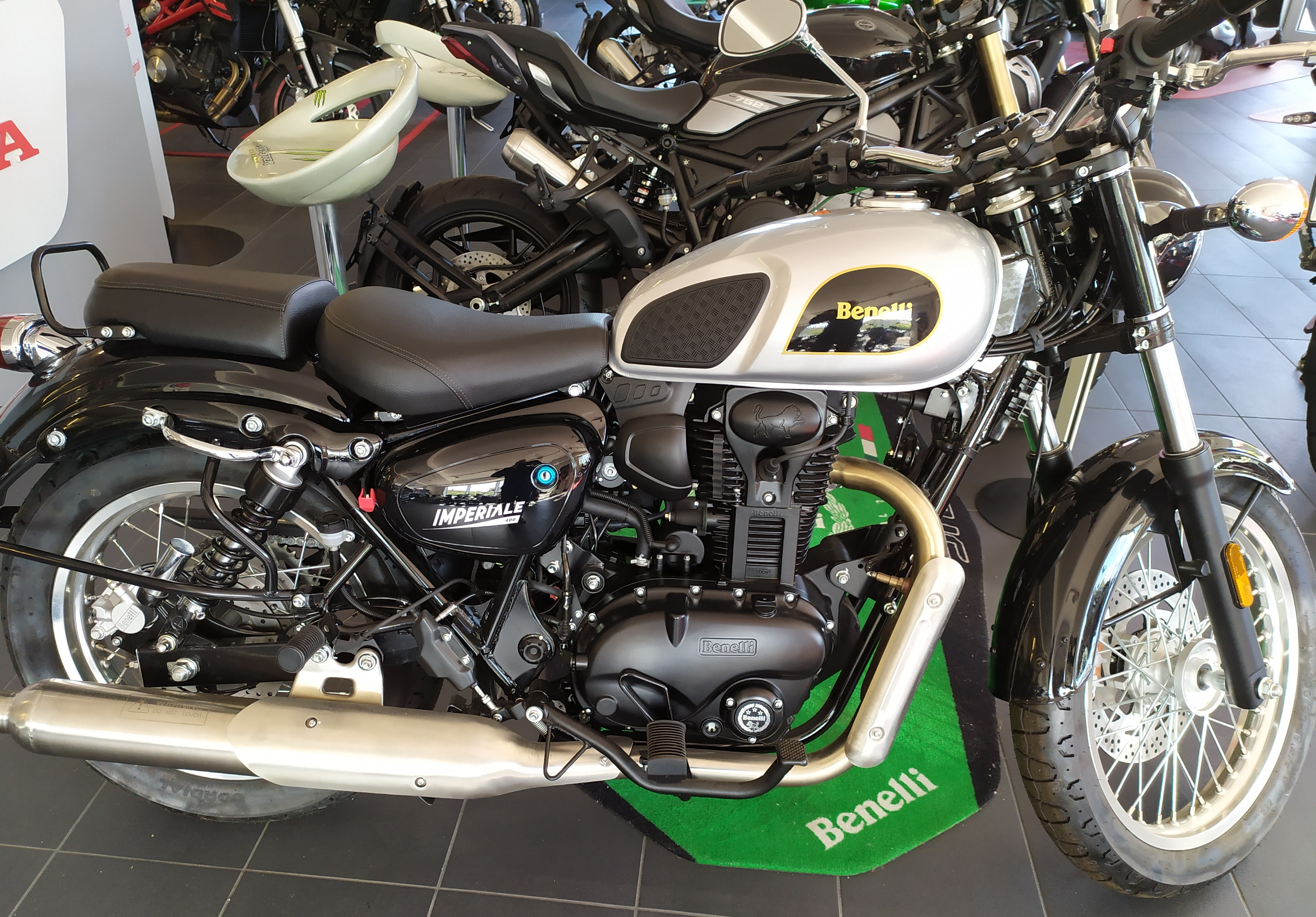 Benelli Imperiale 400